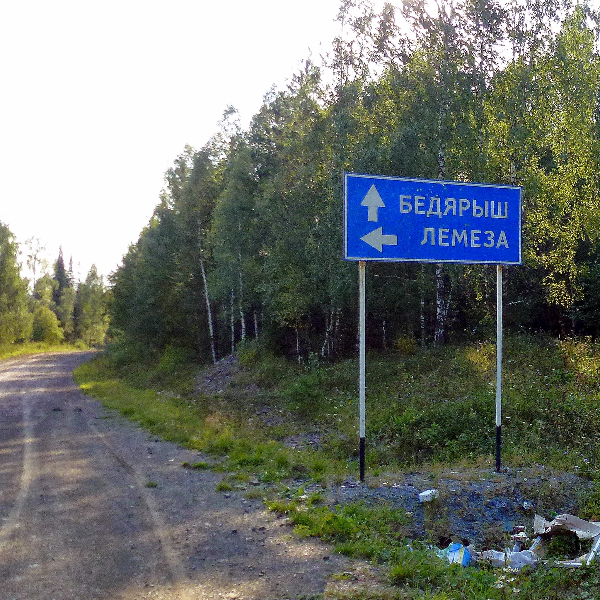 Автотрасса 75К-318 Катав-Ивановск – Лемеза – Бедярыш